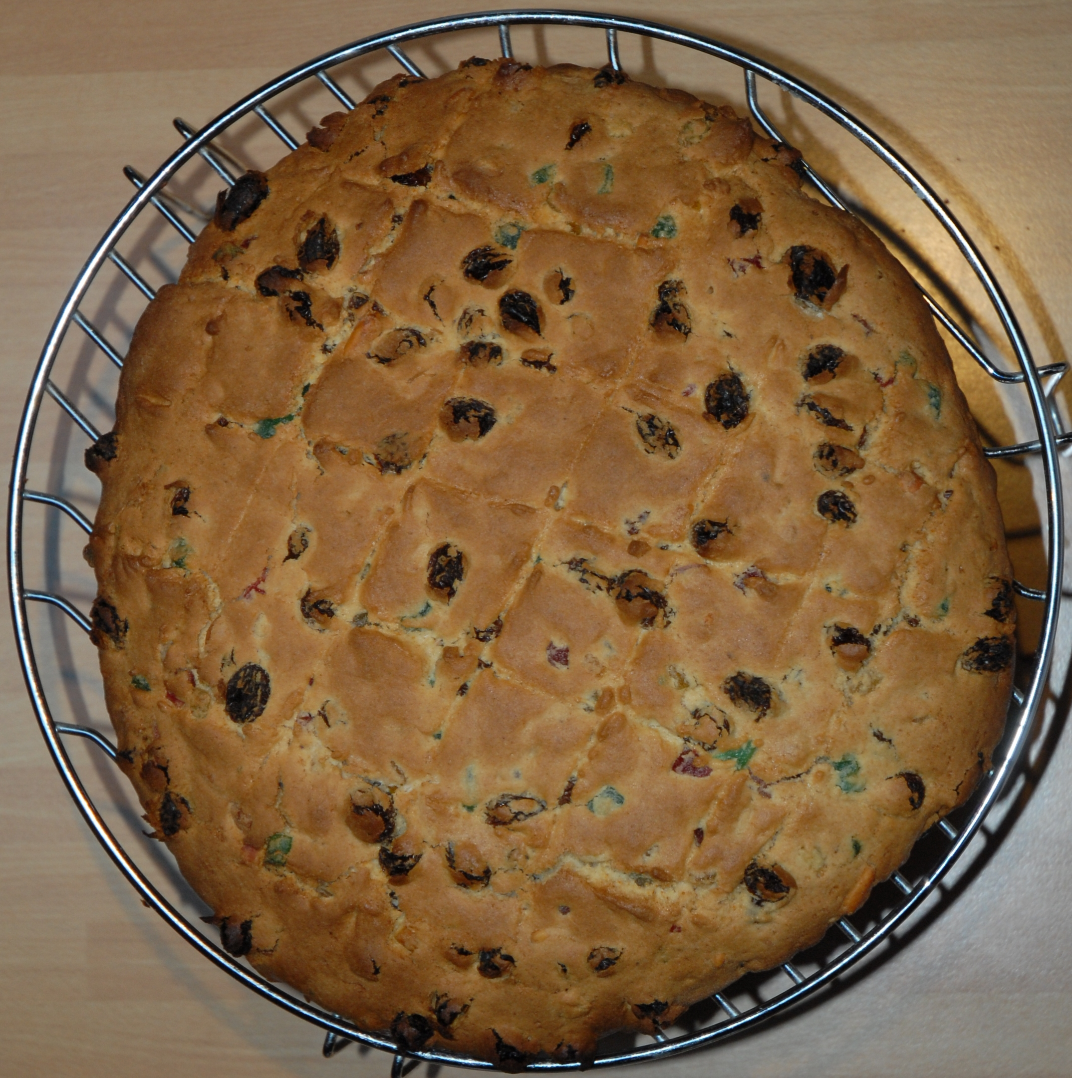 Pandolce de Gênes